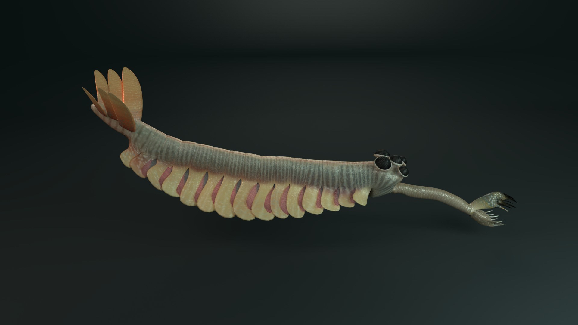 Reconstrucción de Opabinia